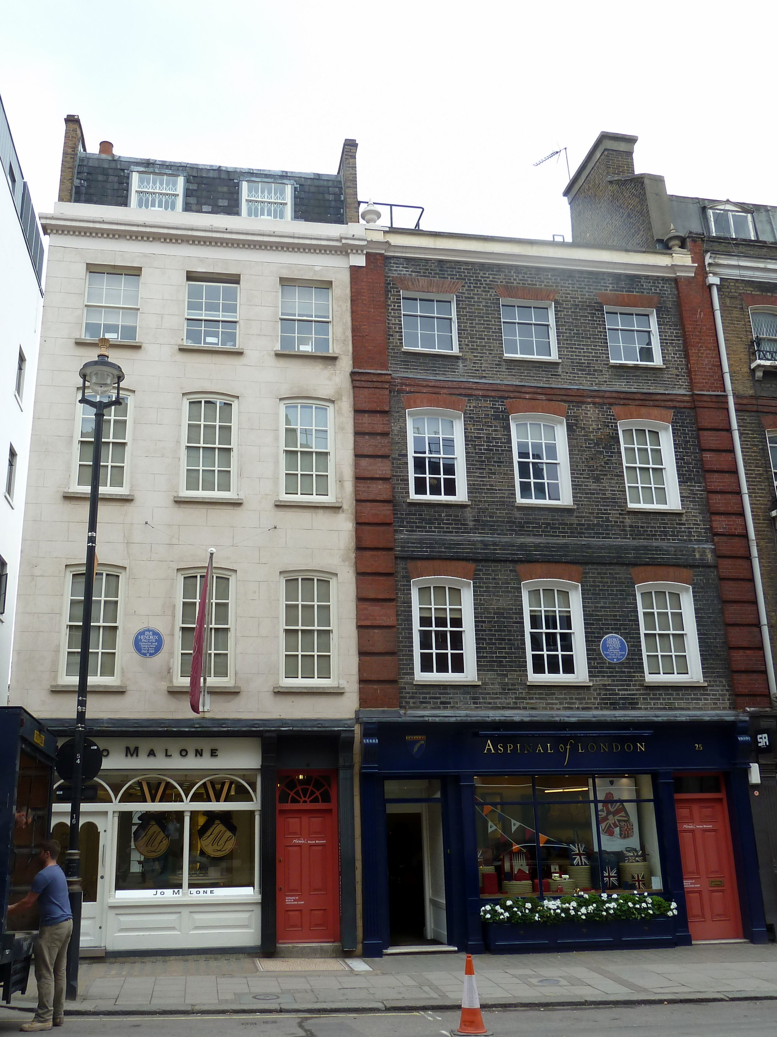 Jimi Hendrix and George Frideric Handel